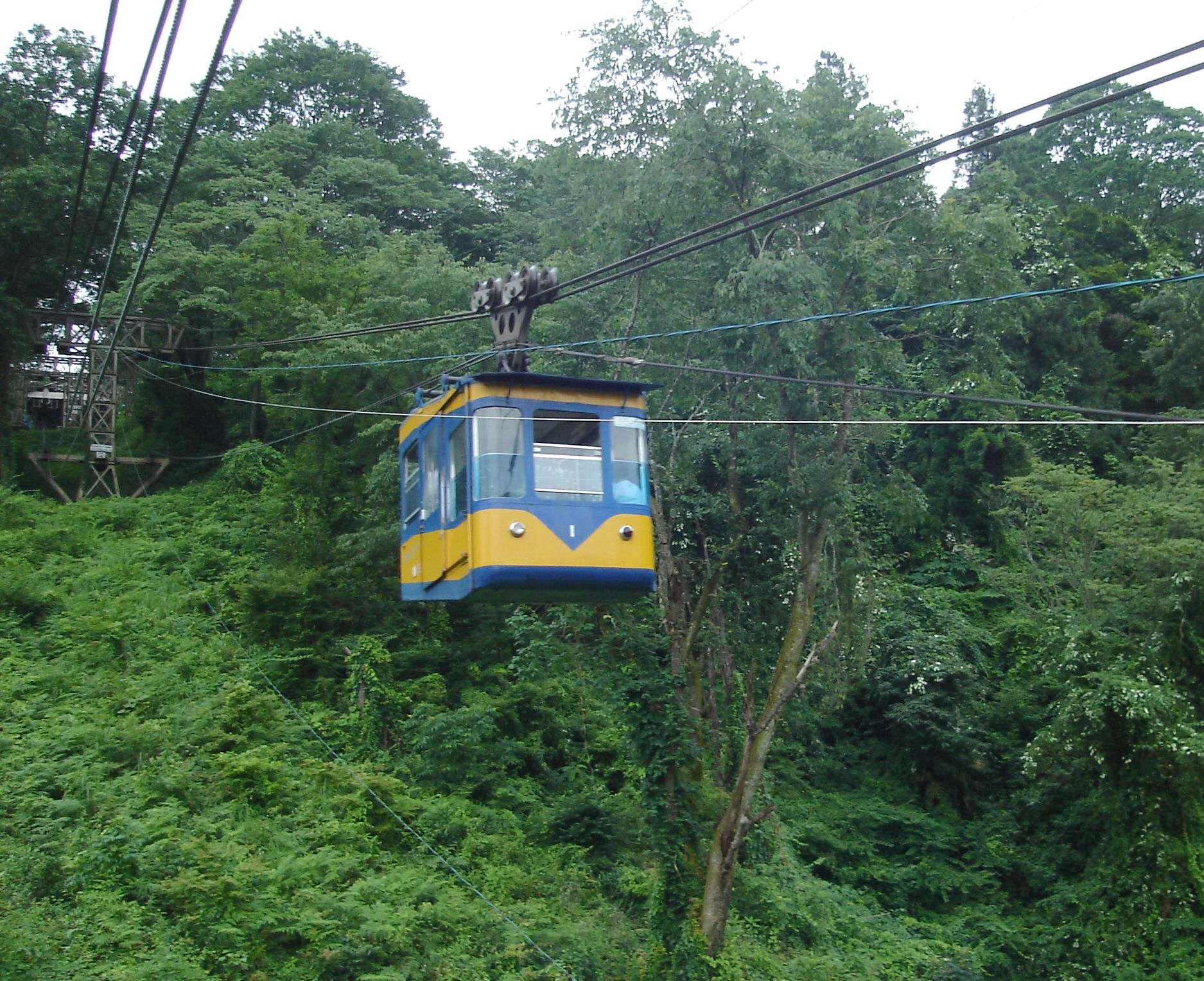 Yoshino RopeWay , nara japan